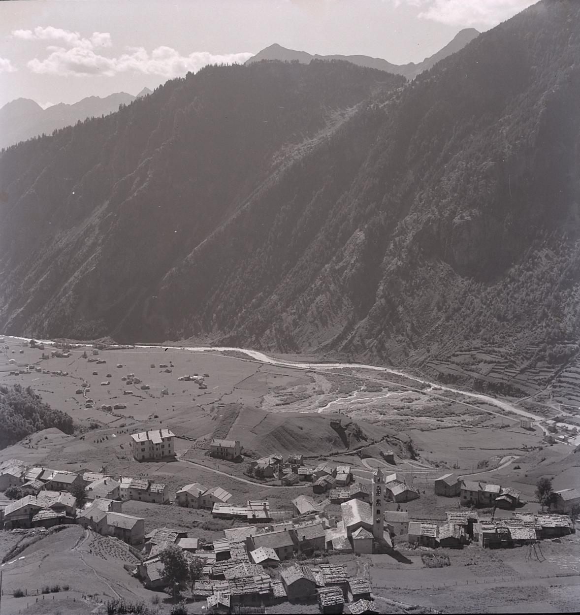 Serie fotografica : Poschiavo, 1975 / Paolo Monti. - Buste: 9, Fototipi: 9 : Negativo b/n, gelatina bromuro d'argento/ pellicola ; 6x6. - ((Serie costituita da 9 negativi identificati con la numerazione: 3725-3733. Sulla busta R3725 manoscritto: "Le Prese/ Paesaggi". La suddetta serie è contenuta nella scatola identificata con la numerazione R3499/3788. Sul coperchio iscrizione manoscritta a pennarello: "1 Località varie".